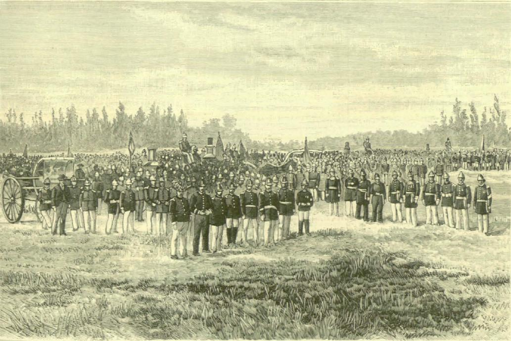 Santiago de Chile. Revista general del cuerpo de bomberos de la capital en el campo de marte. (de fotografias remitidas por Benito Gracia Valdivieso.)